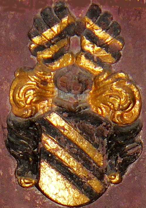 Wappen der Vorfahren von Caspar von Schutzbar und Frau auf ihrem Epitaph in der ev. Kirche in Treis an der Lumbda (Hessen, Deutschland). Männliche Linie: 01m - 16m; weibliche Linie: 01w - 16w.